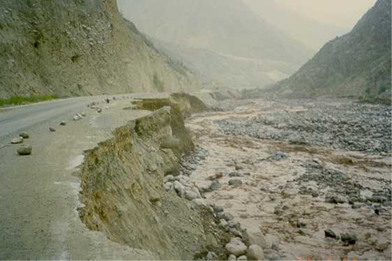 Erosiòn de la carretera al fondo de un valle andino en Perú, resultado del Fenòmeno El Niño 1997-98.